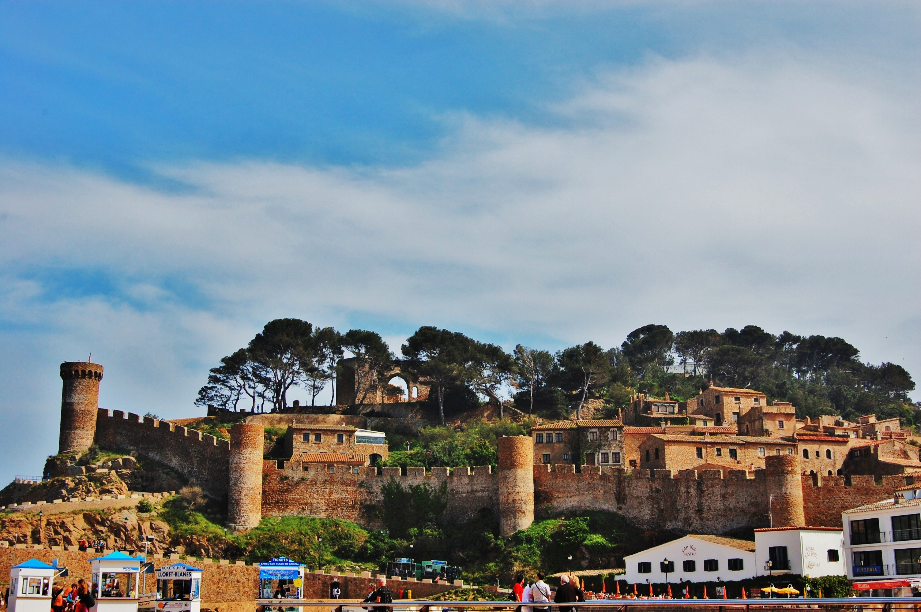 Recinte emmurallat i Castell de Tossa (Tossa de Mar)